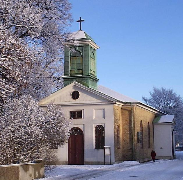 Mariakyrkan i Göteborg, den 20 december 2004. En bild tagen av Harri Blomberg.